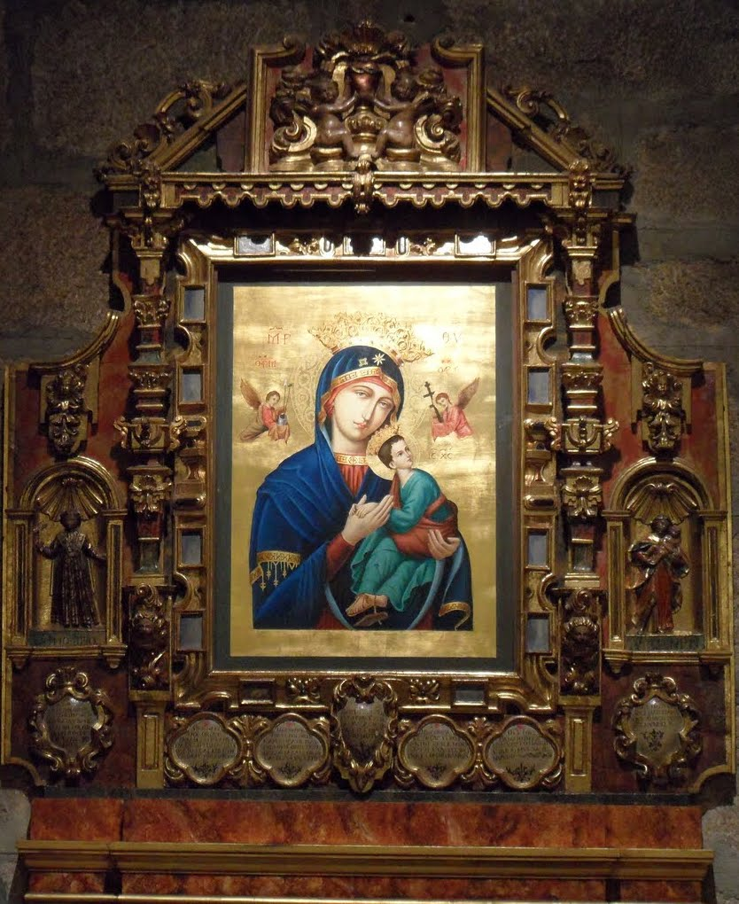 Por el lado izquierdo, se encuentra la capilla y retablo de la Virgen del Perpetuo Socorro. El retablo es del siglo XVIII y el lienzo de 1998 y es una replica al oleo del famoso icono de la iglesia romana de San Alfonso. Alrededor del lienzo hay siete carteles de formas ovaladas en los que se leen textos alusivos a los Siete Dolores de María.